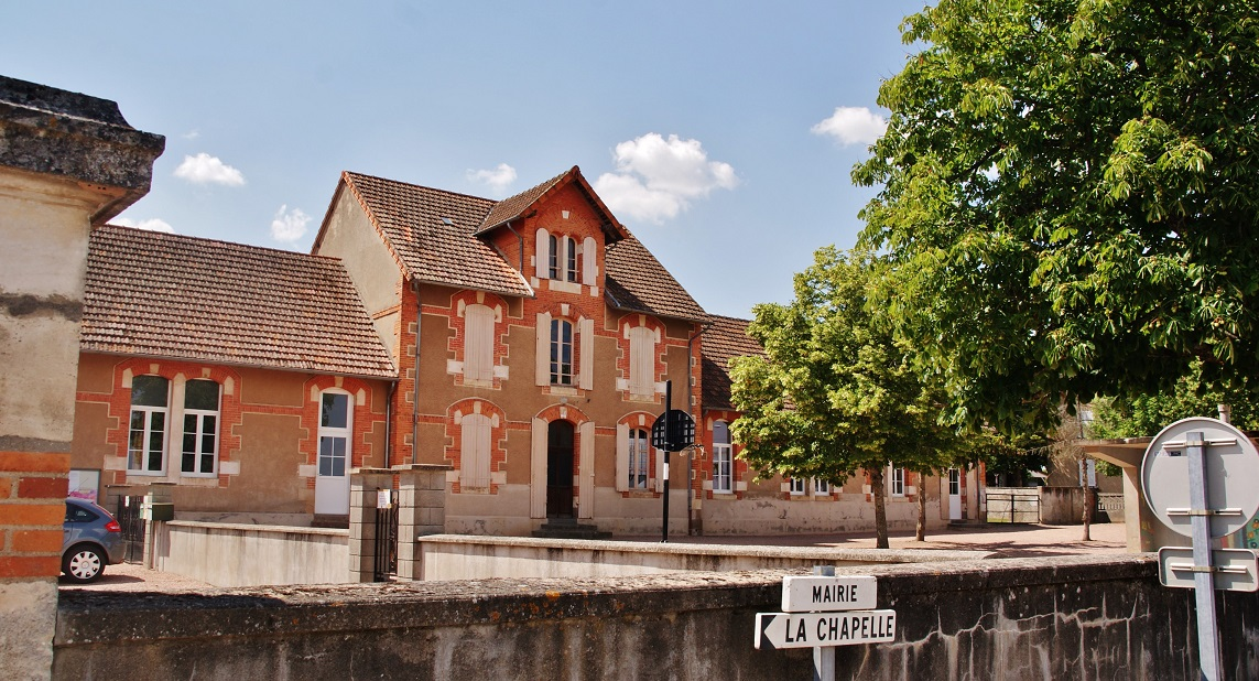 La Mairie